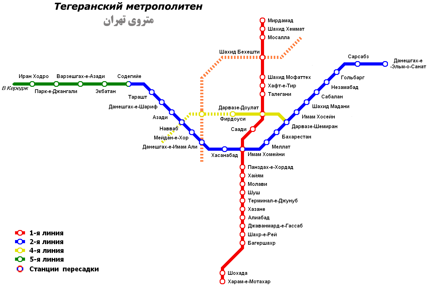 Схема линий Тегеранского метрополитена